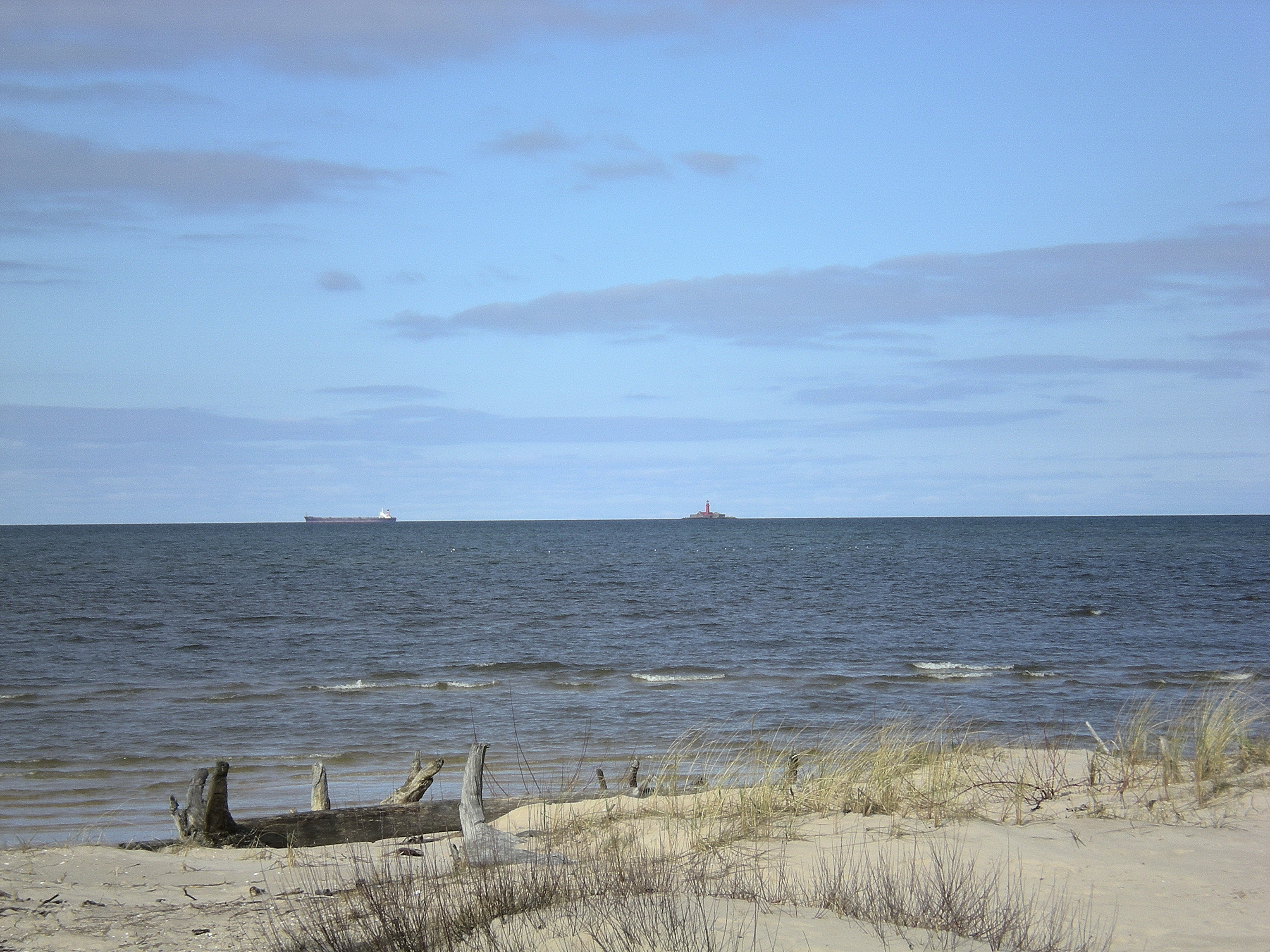 Kolka lighthouse from Kolka Cape